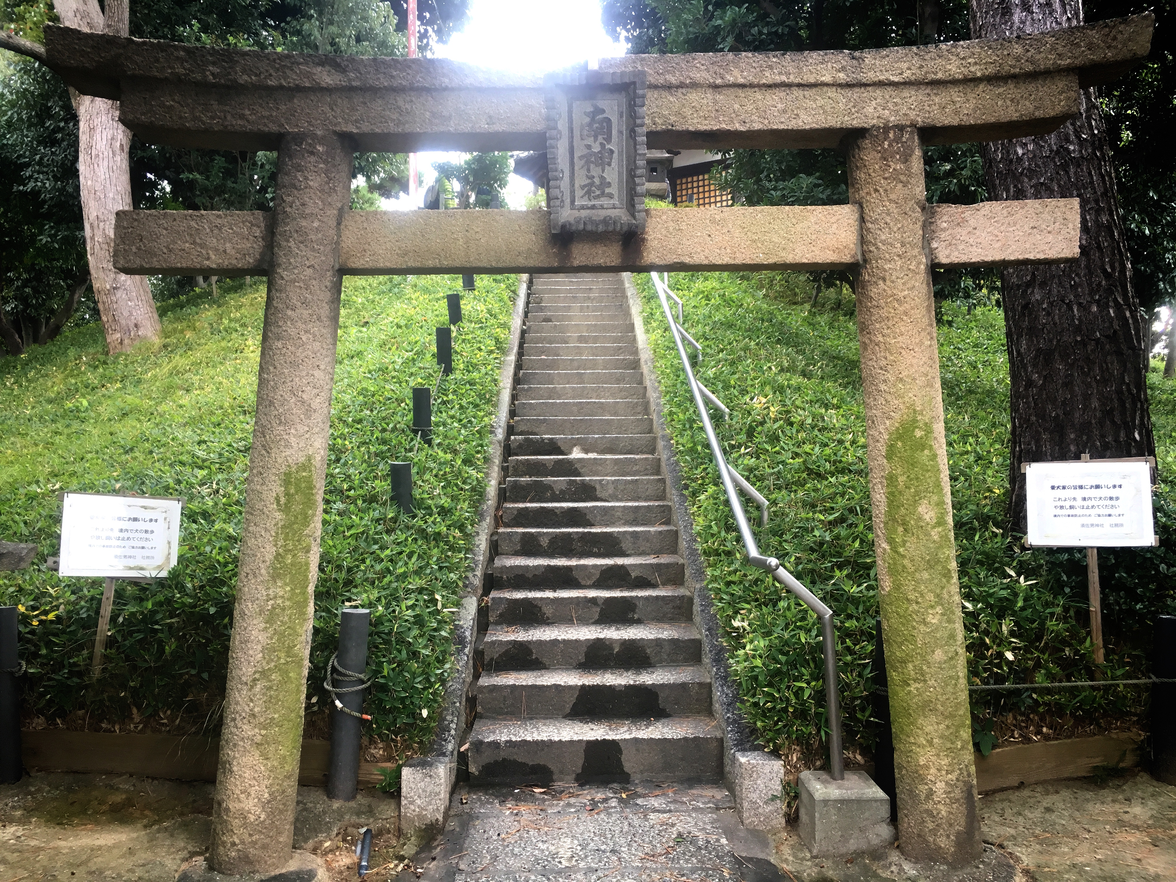 兵庫県伊丹市にある御願塚古墳内の南神社